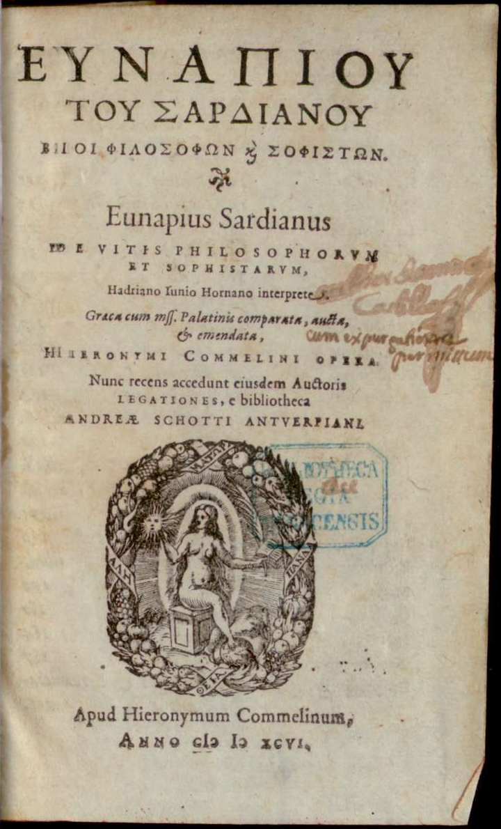 Titelblatt der Vitae sophistarum des Eunapios von Sardes; griechisch-lateinische Ausgabe von Hadrianus Junius, Heidelberg 1596.